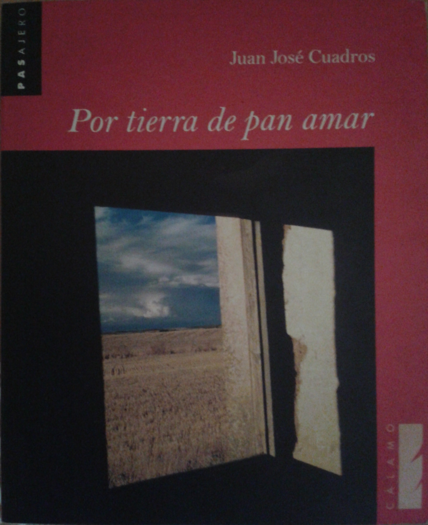 Por tierra de pan amar de Juan José Cuadros